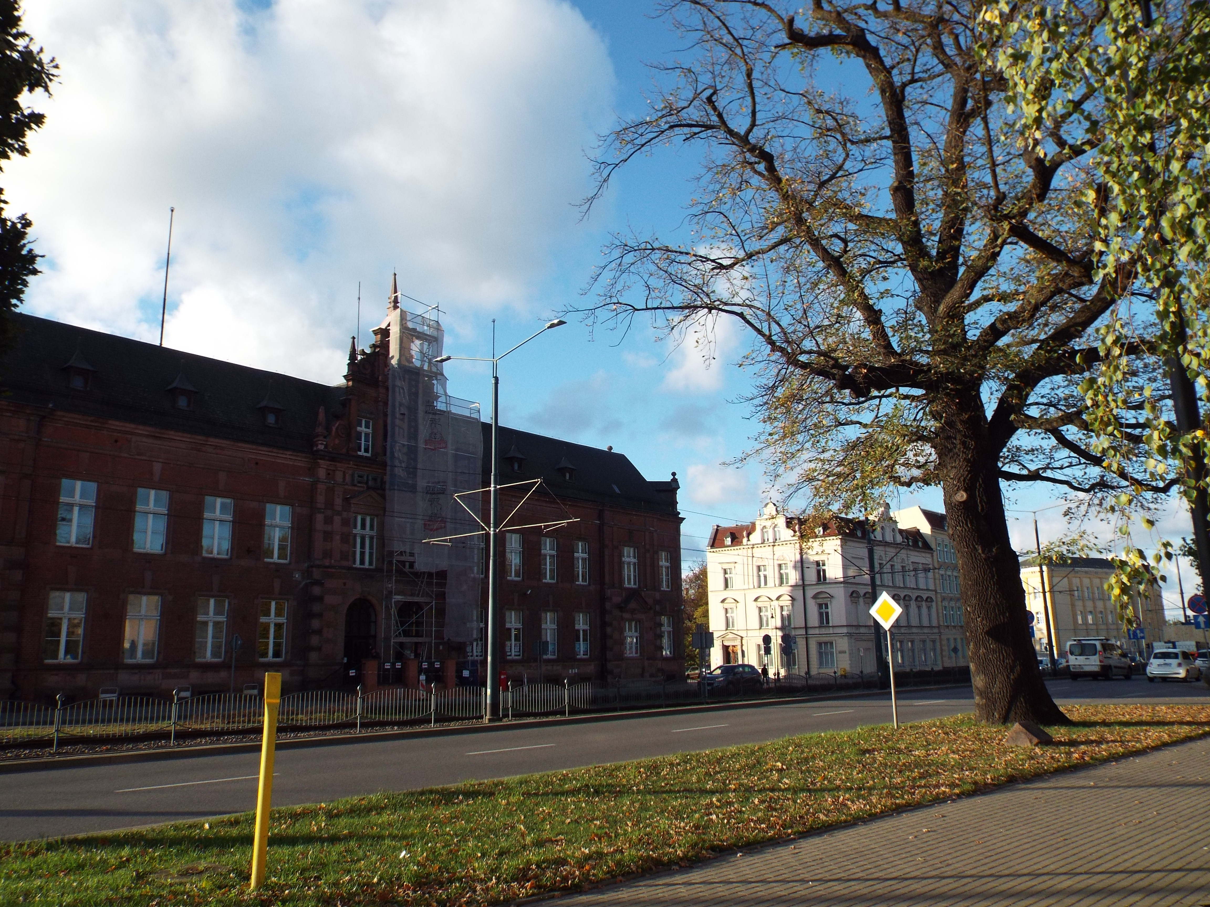 Elbląg, pl. Słowiański - stuosiemdziesięciodwu letni dąb